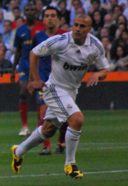 Fabio Cannavaro, en un Real Madrid - Barça